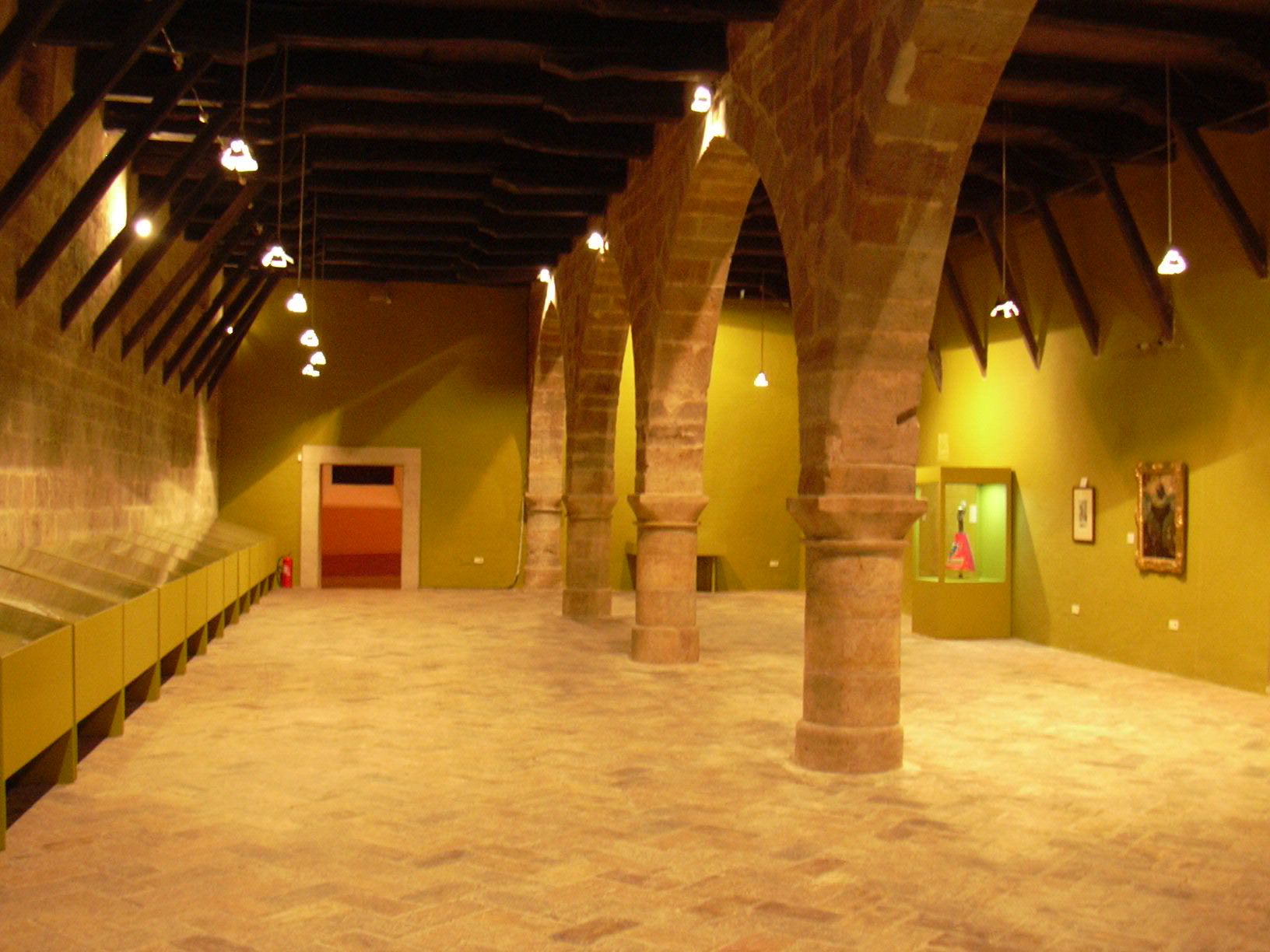 Veruella - Cilla